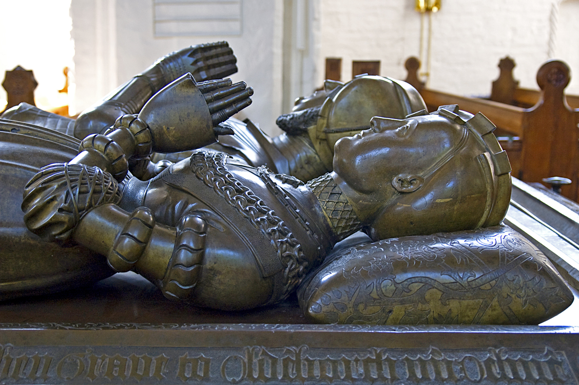 Kloster Bordesholm - Klosterkirche - Bronzetumba (1) Kloster Bordesholm - Klosterkirche - Detail der Bronzetumba mit den liegenden Figuren des Herzogpaares Anna von Brandenburg und Friedrich I. von Schleswig-Holstein-Gottorp